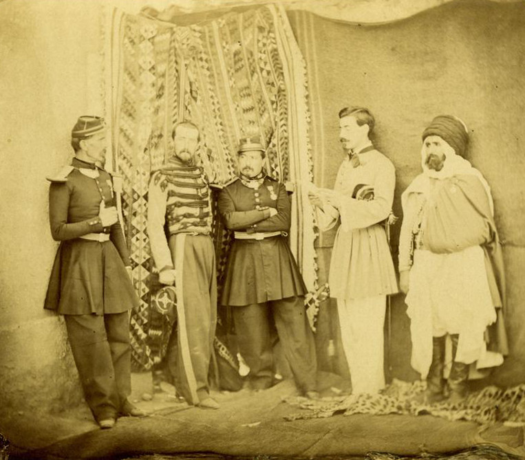 De gauche a droite: Charles Rose, Lieutenant Géraldini, Joseph Adrien Séroka, Charles Lucien Saint Martin et Mohammed Srir, Caid de Biskra